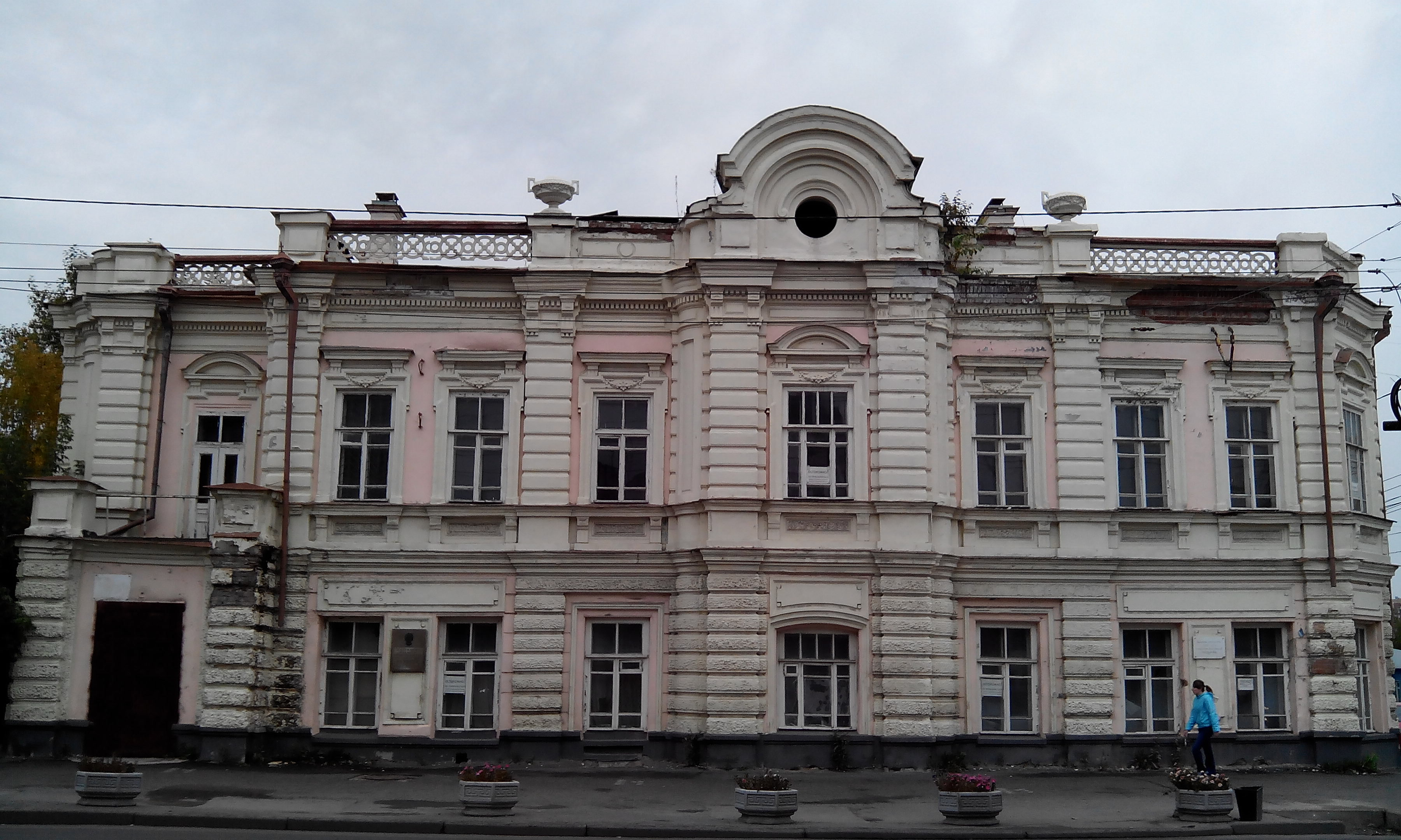 Дом жилой (Тюменская область, Тюмень, улица Ленина, 10)